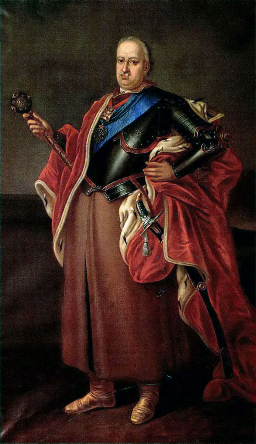 Беларуская (тарашкевіца): Партрэт Міхала Казімера Радзівіла «Рыбанькі» (Michał Kazimier Radzivił «Rybańka»)